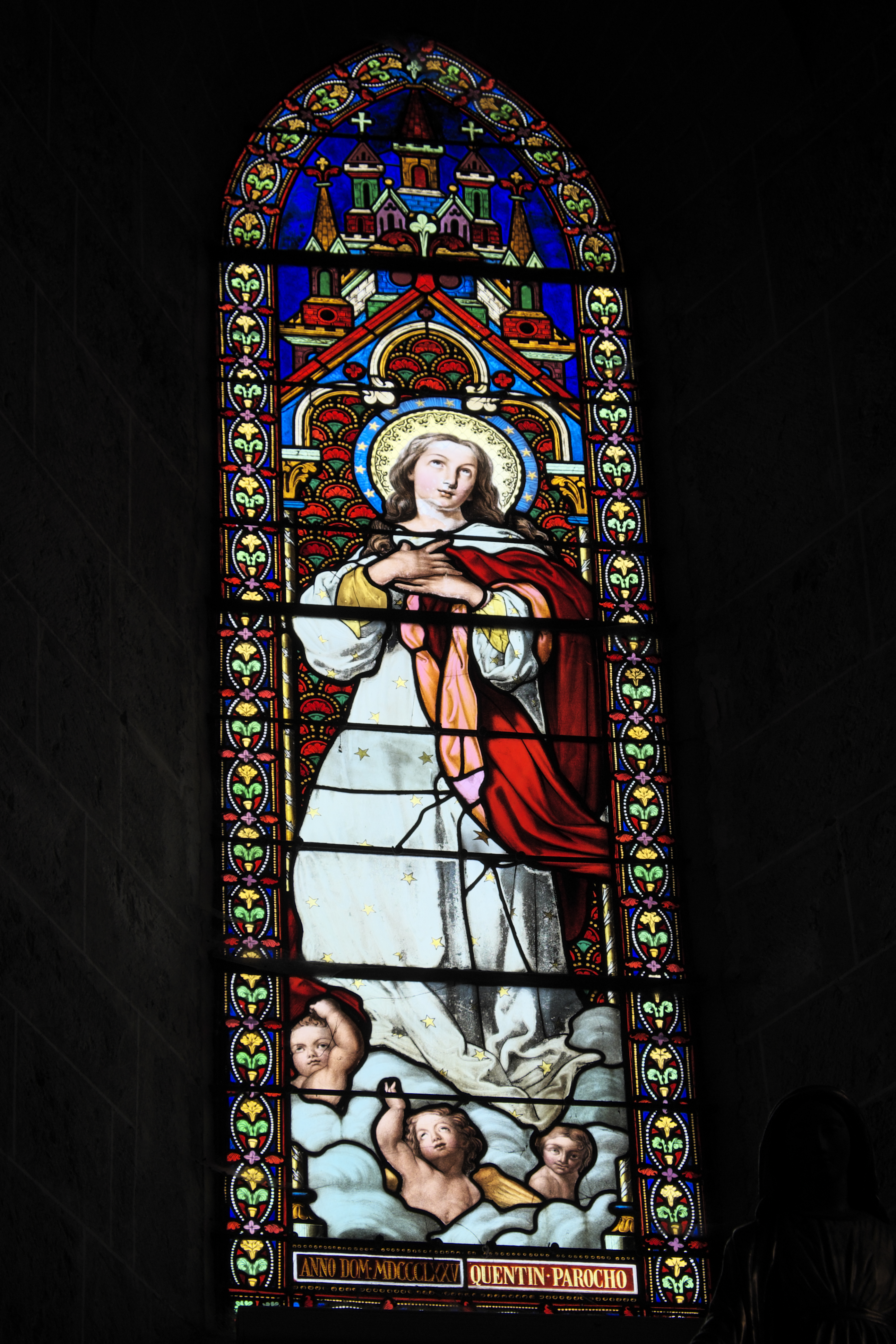 Katholische Pfarrkirche Notre-Dame-de-l'Assomption (Mariä Himmelfahrt) in Boigneville im Département Essonne (Île-de-France/Frankreich), Bleiglasfenster mit der Signatur LORIN (rechts unten, verdeckt), von 1870; Darstellung: Mariä Himmelfahrt